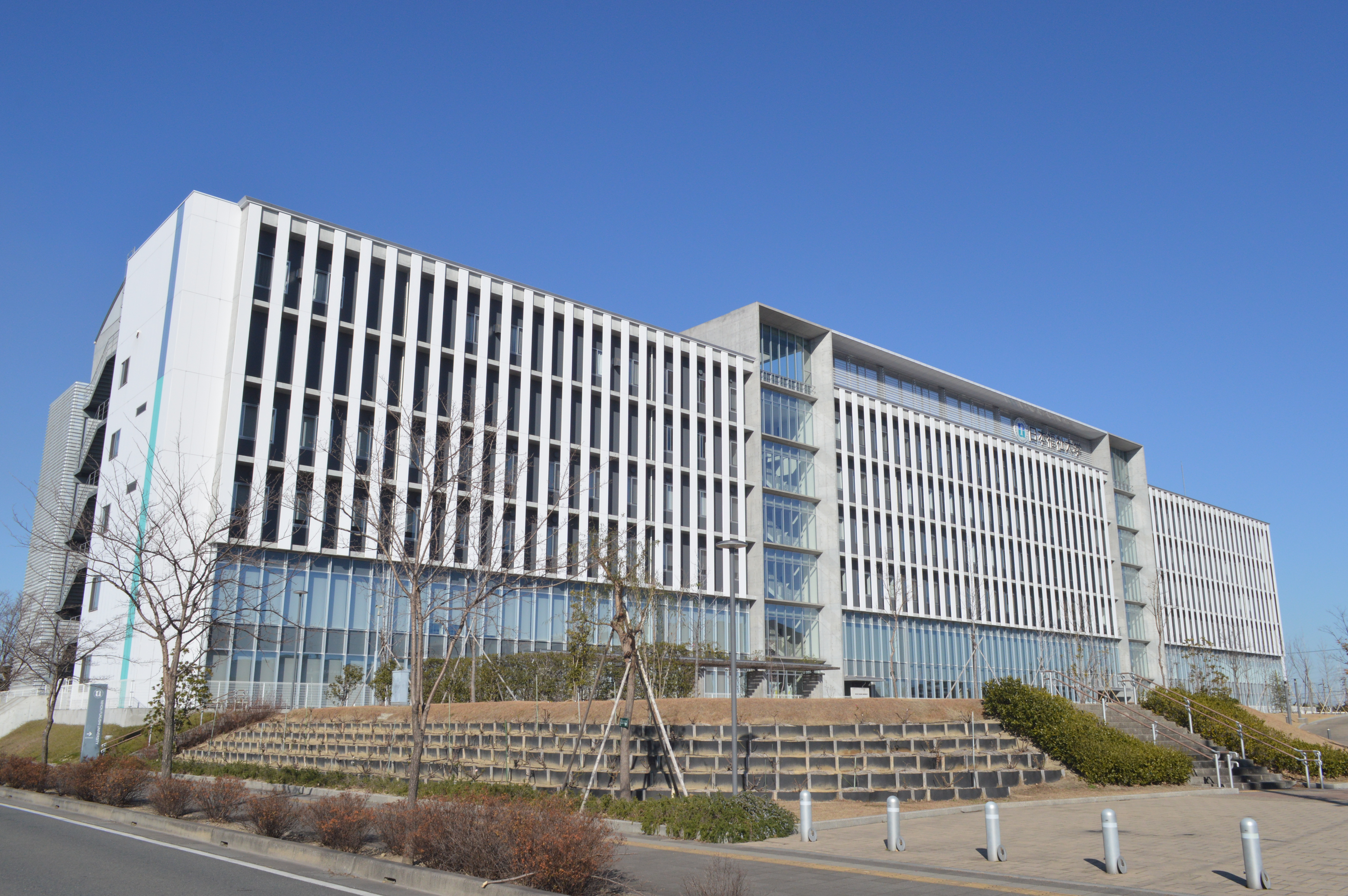 愛知県東海市にある日本福祉大学東海キャンパス。